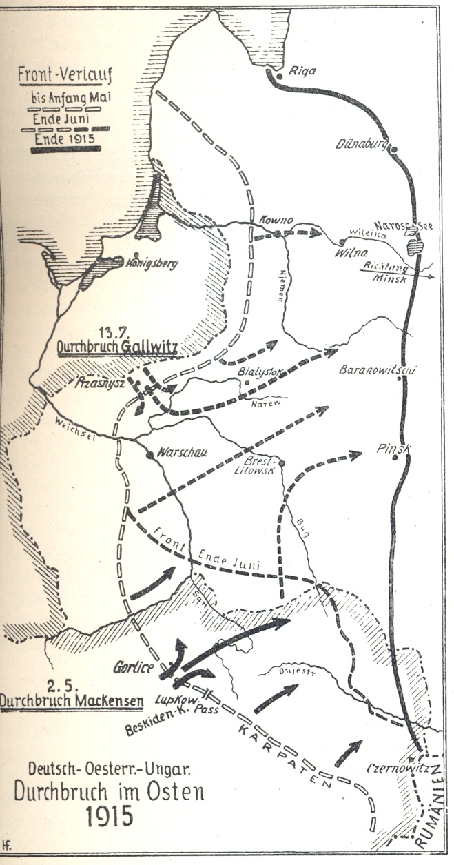 Karte Seite 37: Durchbruch im Osten 1915